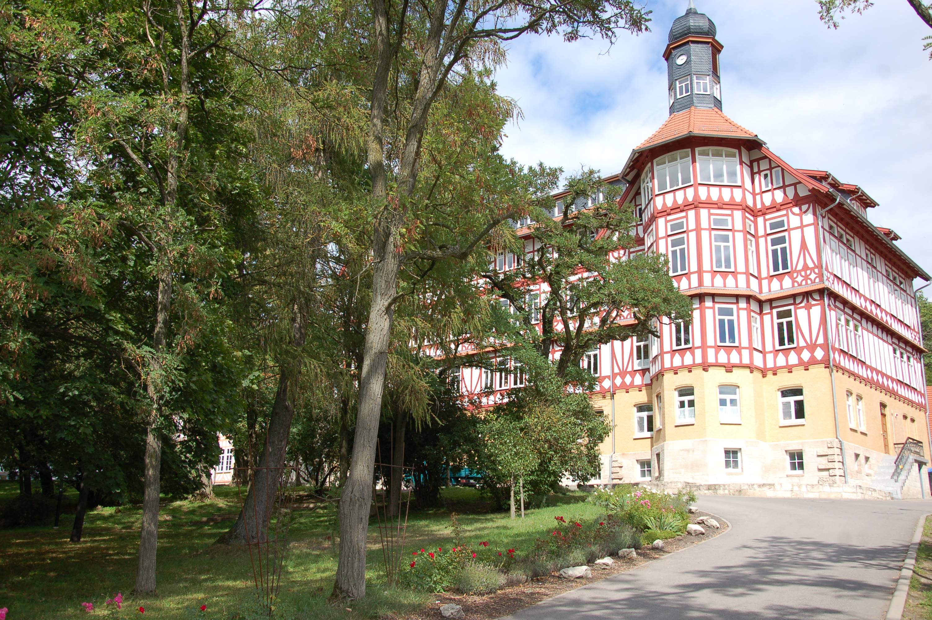 Im Hauptgebäude findet der Unterricht der Klassen 7-10 statt